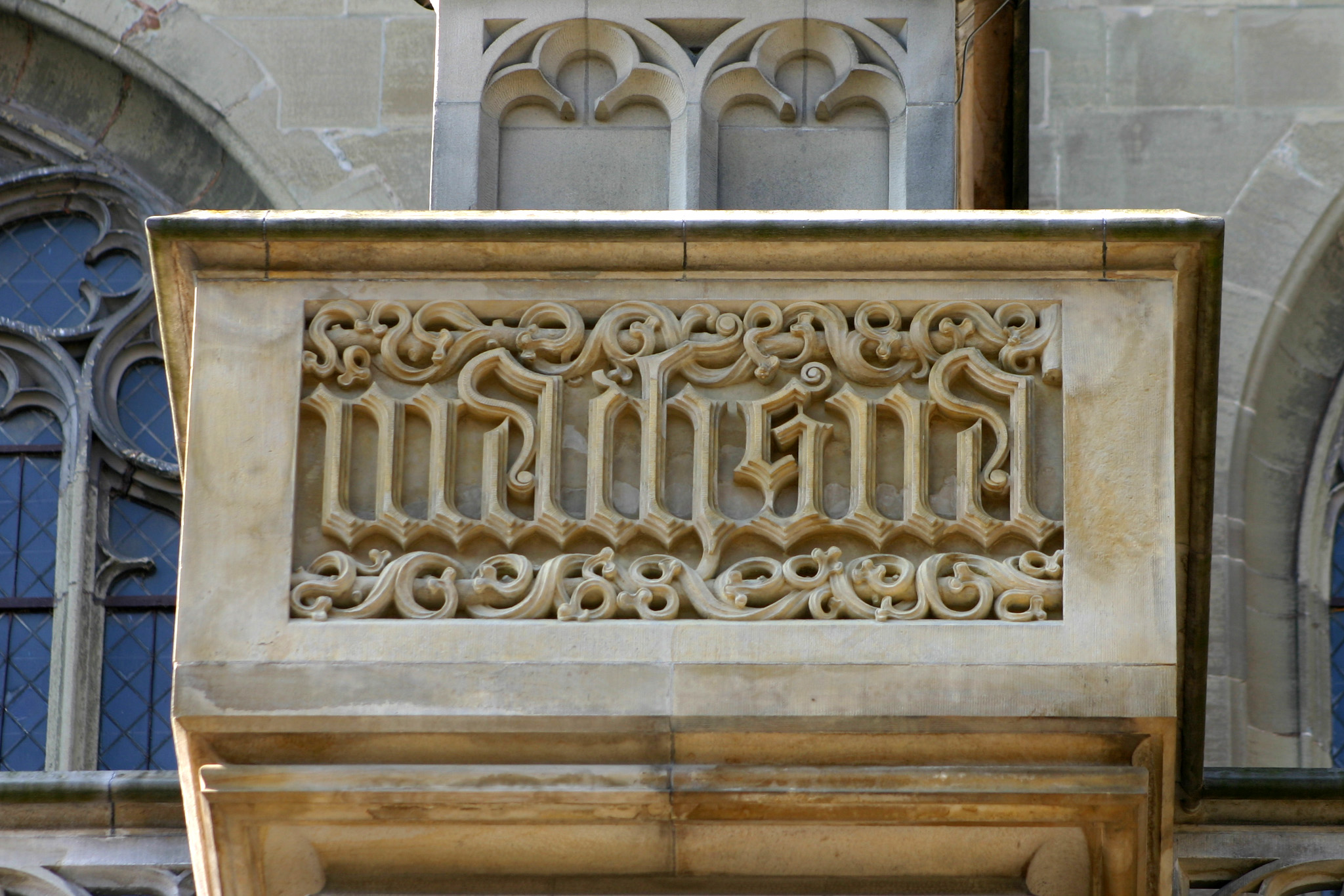 Berner Münster, Bern, Switzerland